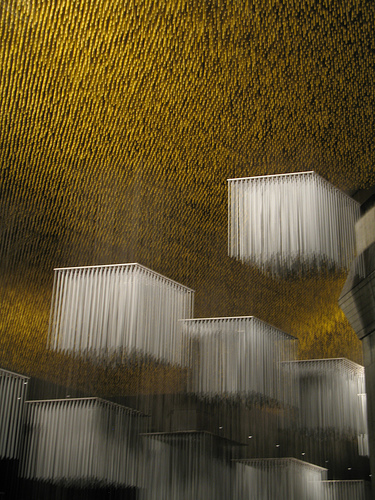 Techo del Foyer